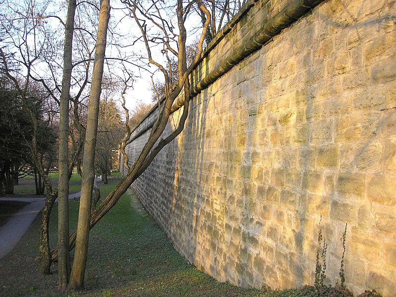 Festung Forchheim (Oberfranken). Kurtine zwischen St Valentini-Werk und der Bastion beim Saltorturm. Eigene Aufnahme, März 2006 / Fortress Forchheim (Upper Franconia, Germany). Curtain wall between the bastions St. Valentini and Saltorturm. Own photo, March 2006